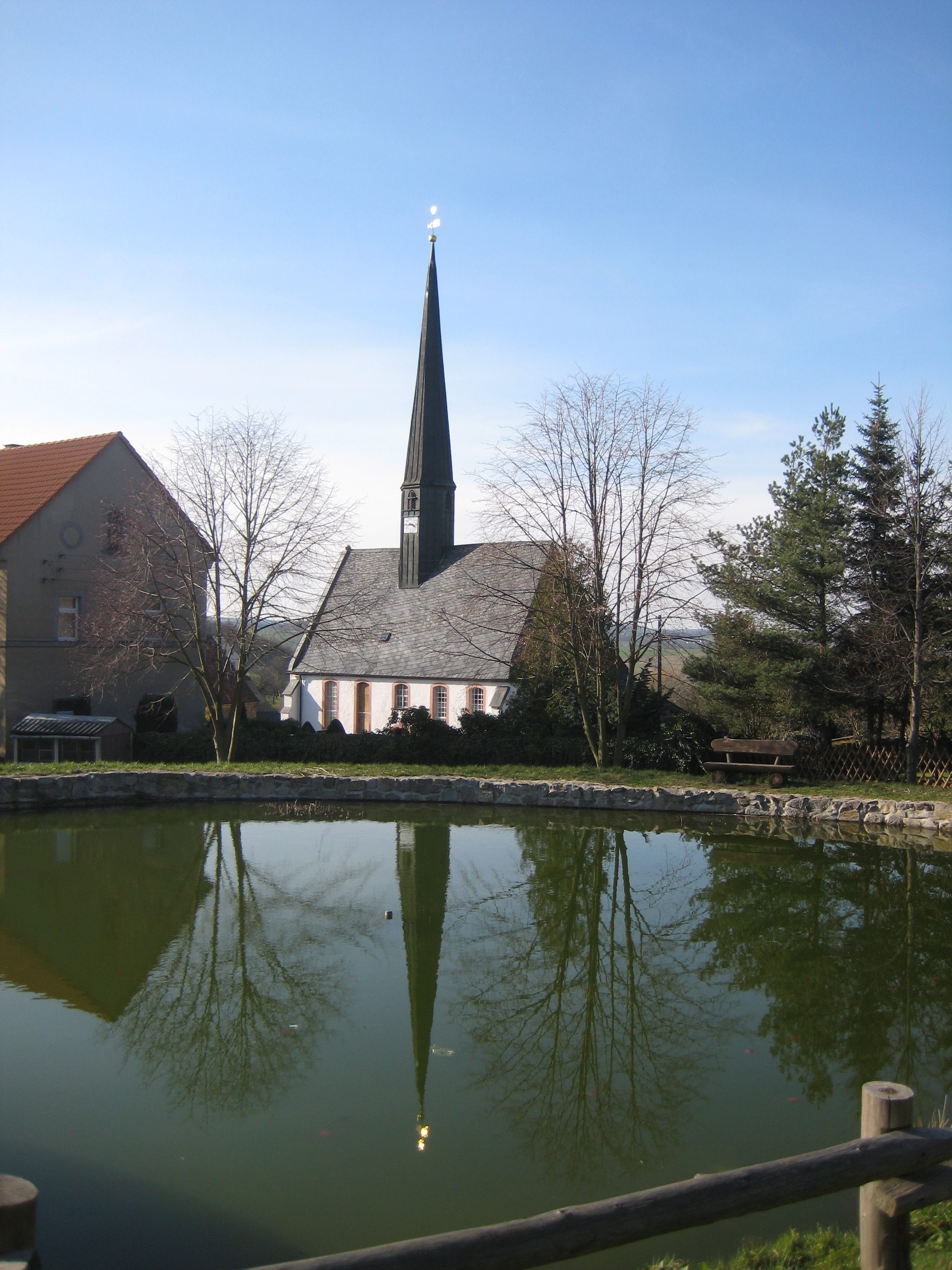 St. Marienkirche Lastau